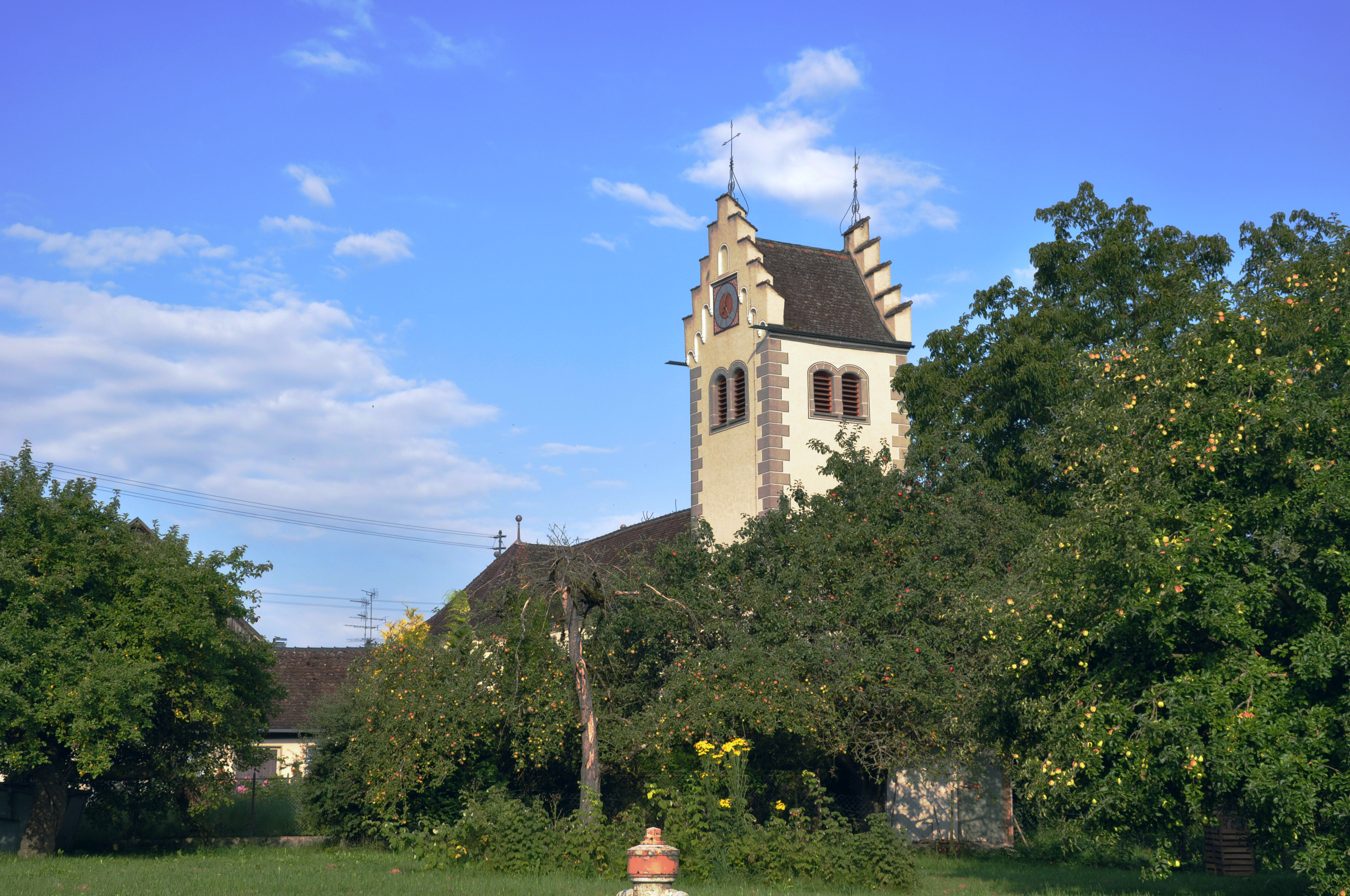 Urnau (Gemeinde Deggenhausertal), Kath. Pfarrkirche Hl. Drei Könige